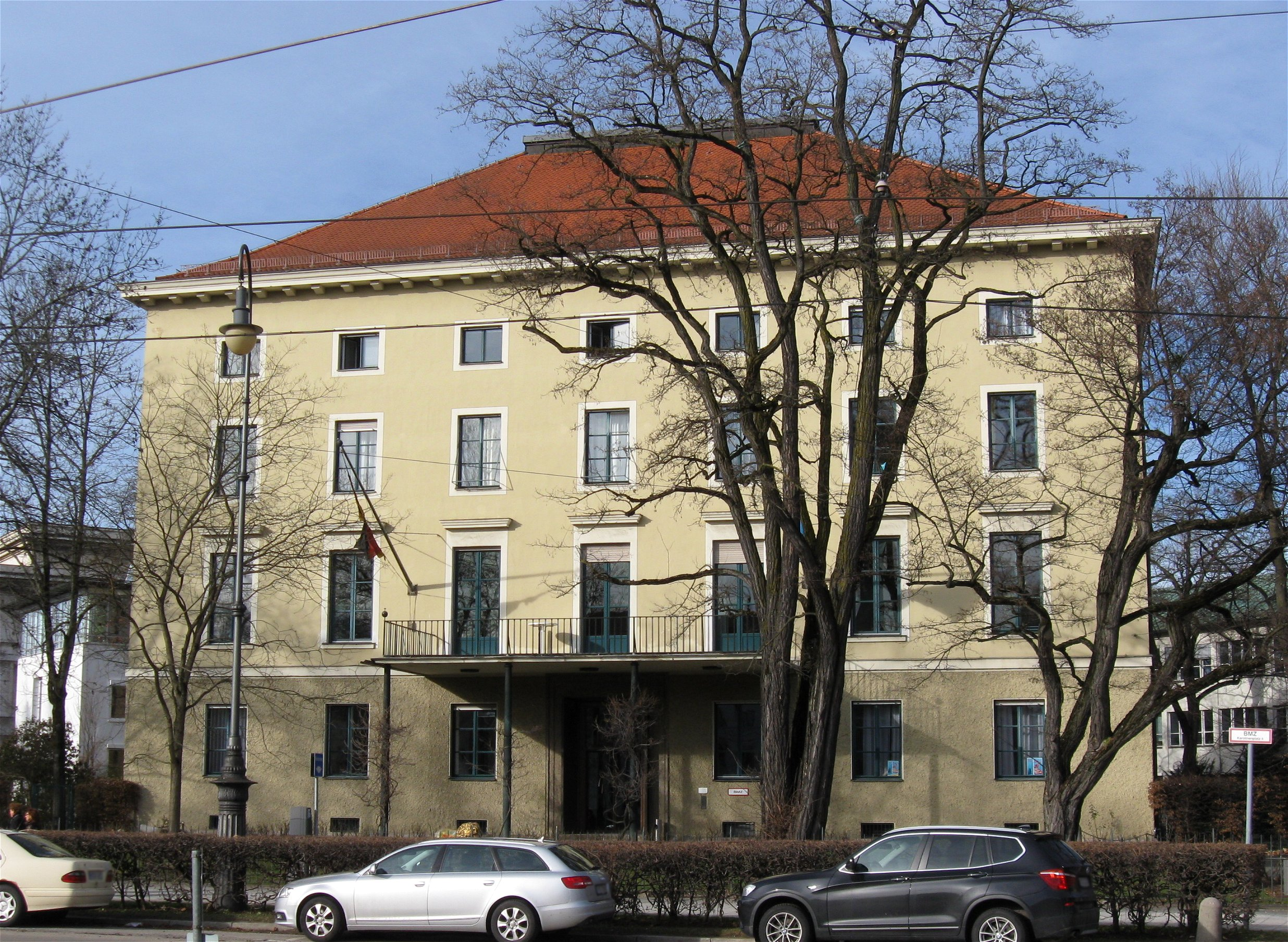 Karolinenplatz 4; Staatliche Lottoverwaltung, Neubau 1953/54 von Carl Kergl in Anlehnung an das ehemalige Törring-Palais Karl von Fischers von 1812. Zugehörig zwei freistehende Nebengebäude, das linke an der Brienner Straße noch klassizistisch, das rechte an der Barer Straße um 1954 erneuert.